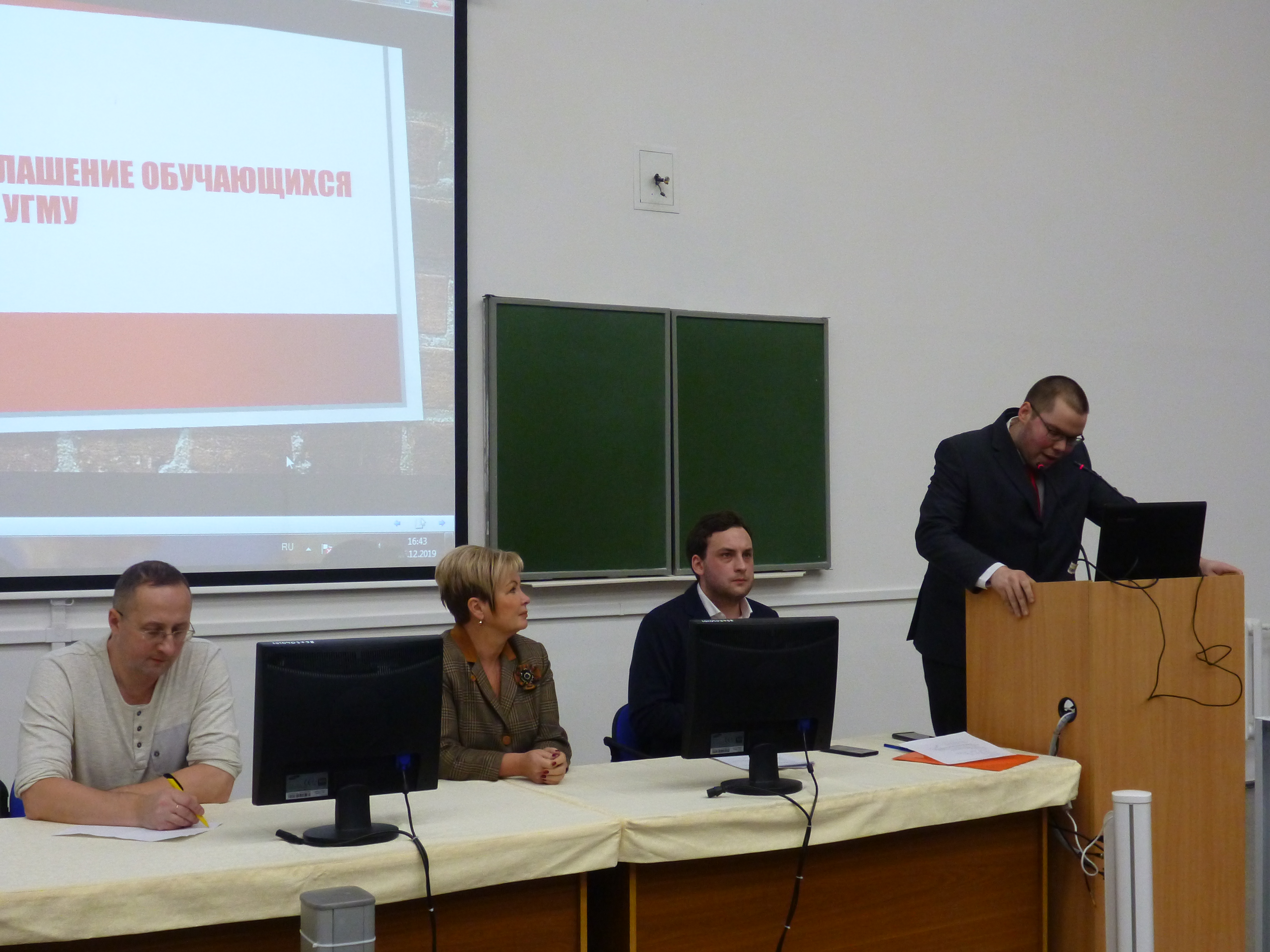 Презентация Максимова на профсоюзной конференции 6 декабря 2019 года